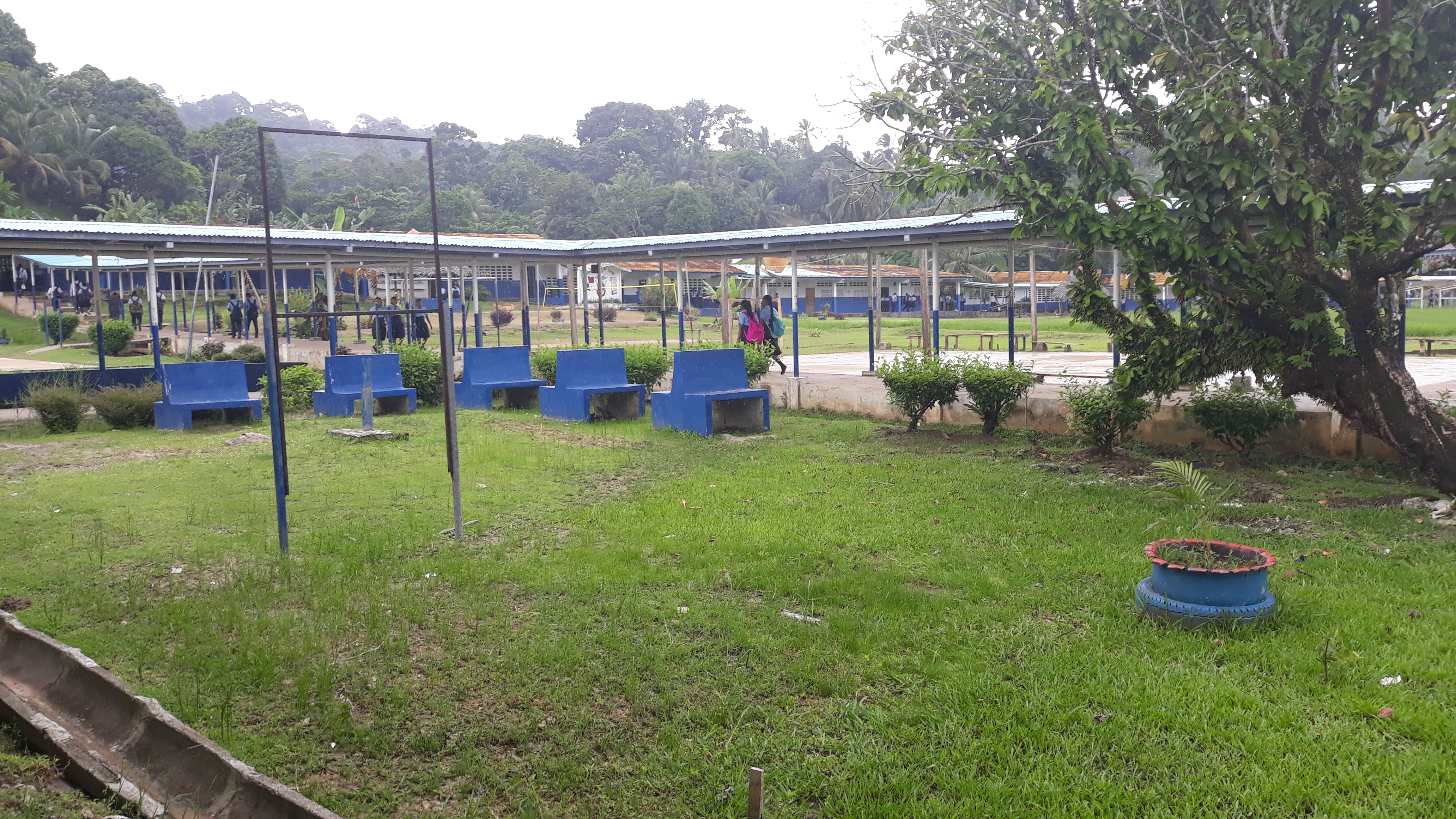 centro educativo de kusapin